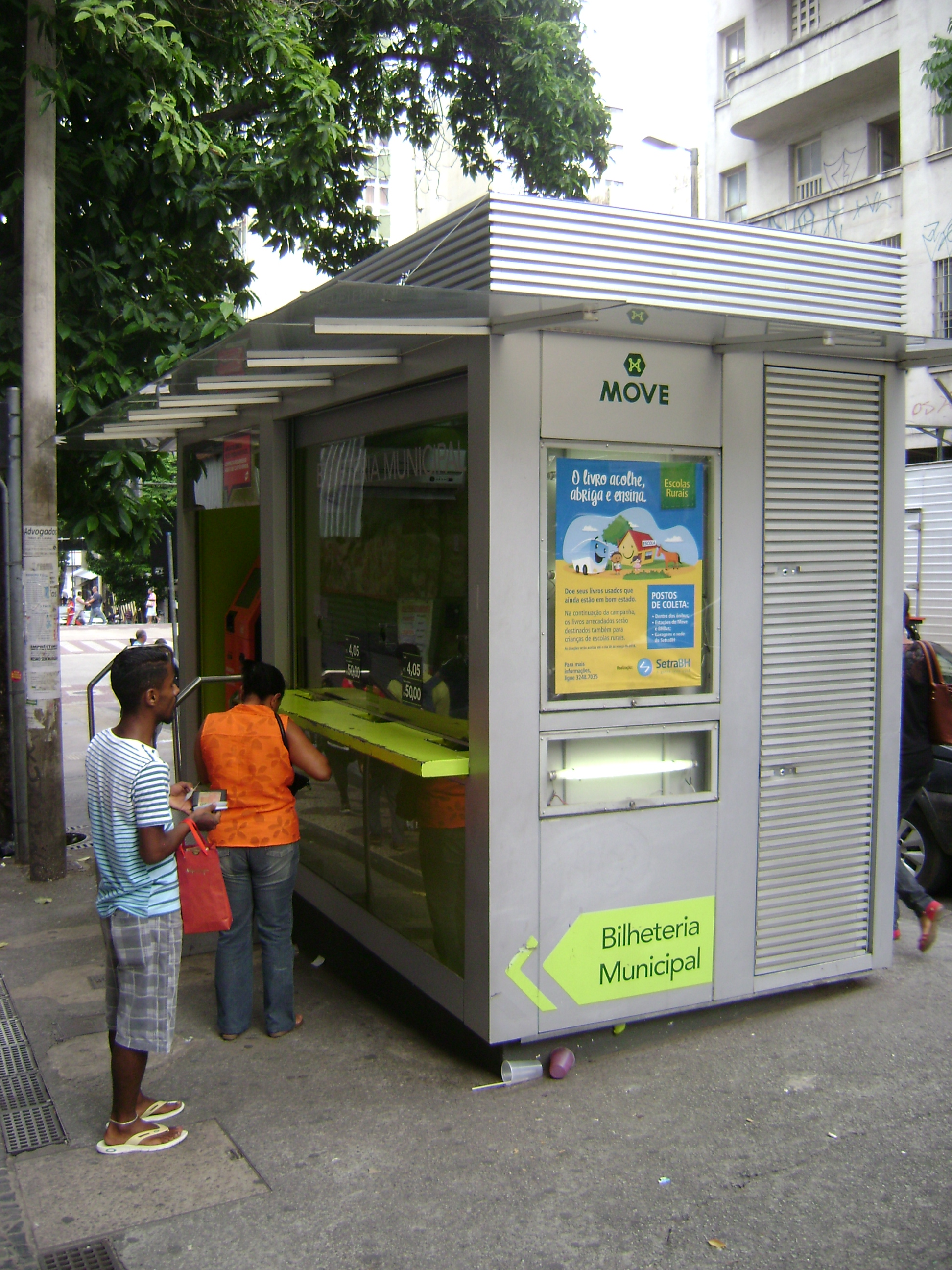 Bilheteria do Move na rua Rio de Janeiro, em Belo Horizonte.